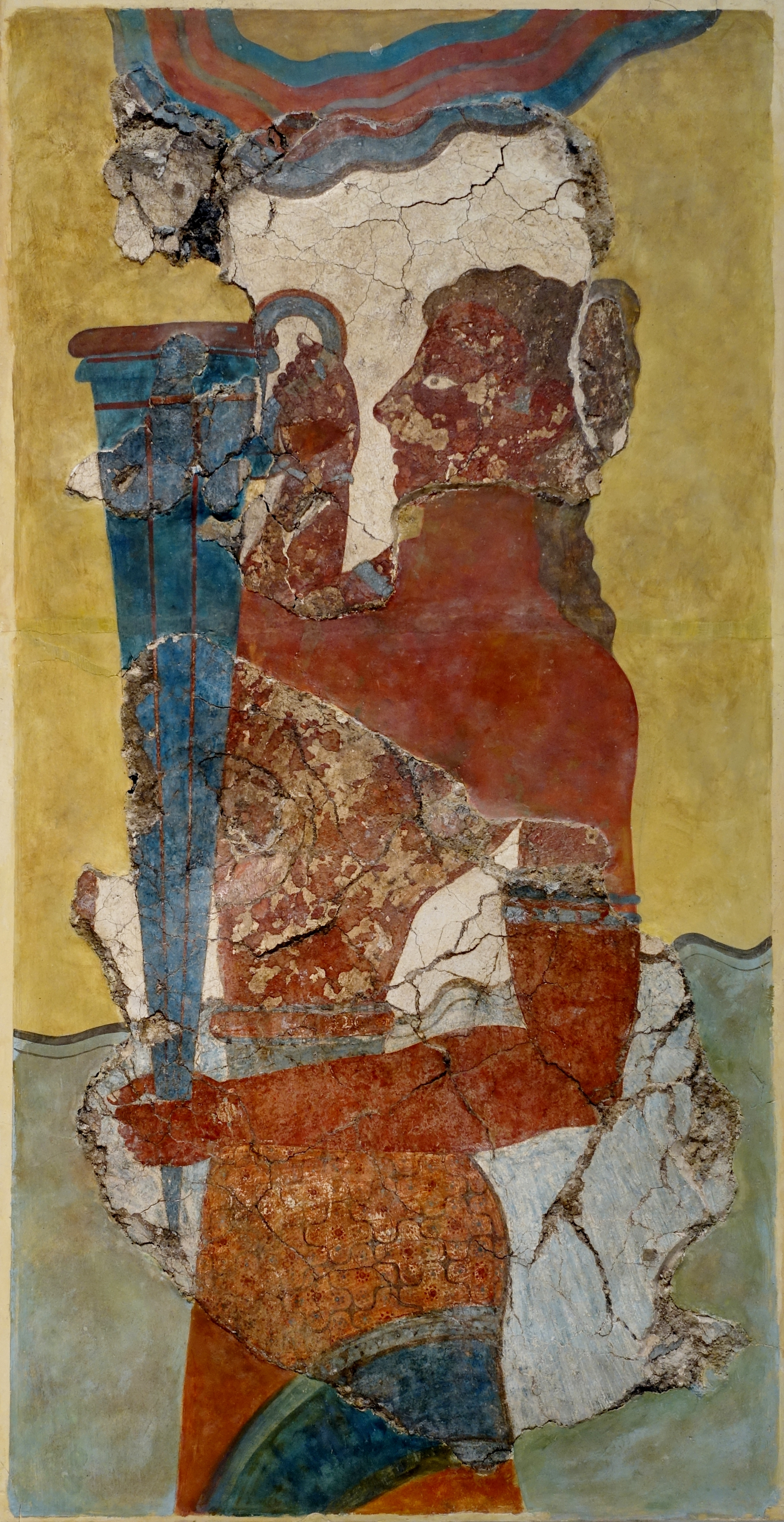 Rhytonträger des Prozessionsfreskos aus dem Palast von Knossos (um 1400 v. Chr.), ausgestellt im Archäologischen Museum Iraklio, Kreta, Griechenland